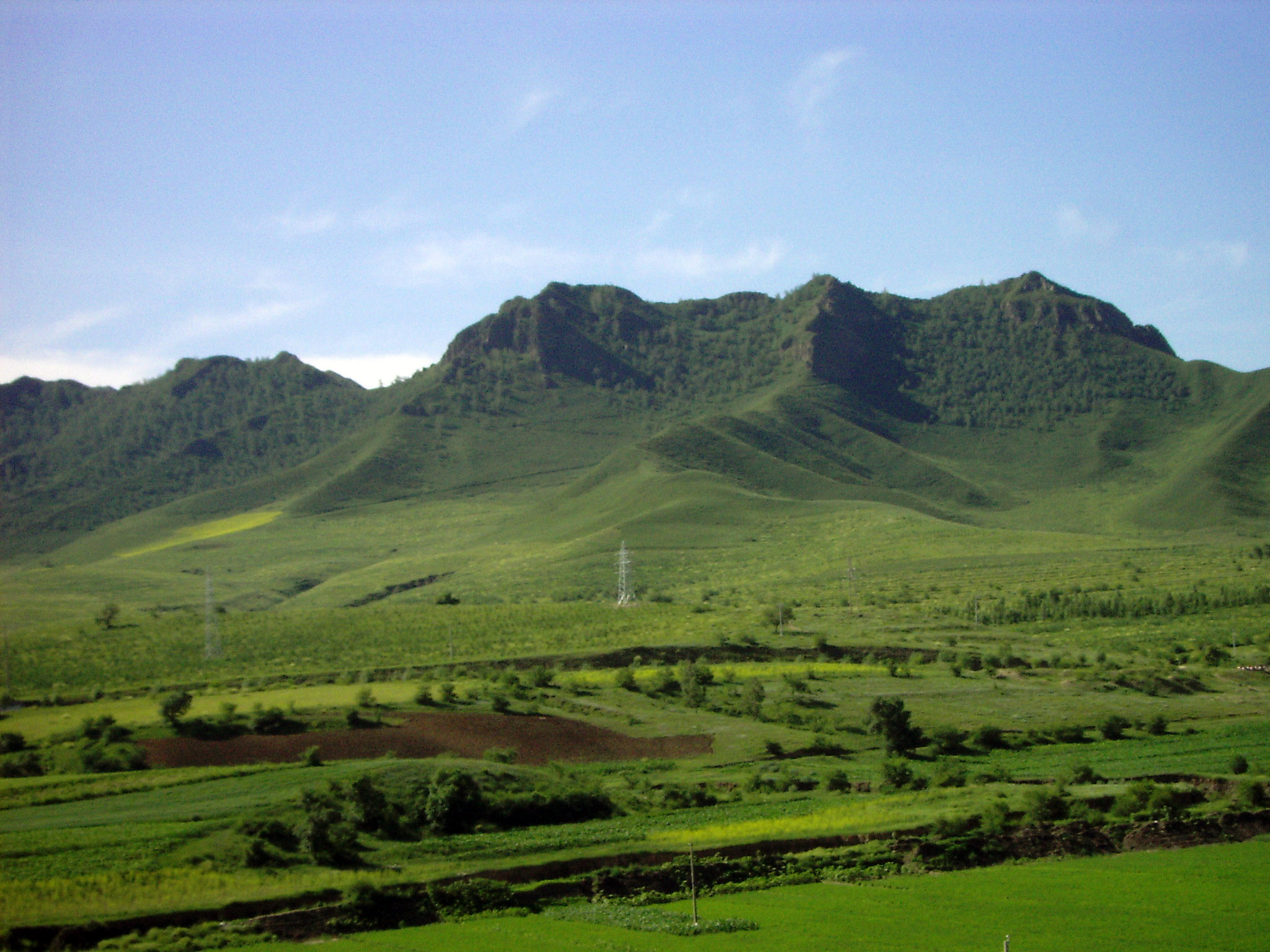 咣咣咣咣